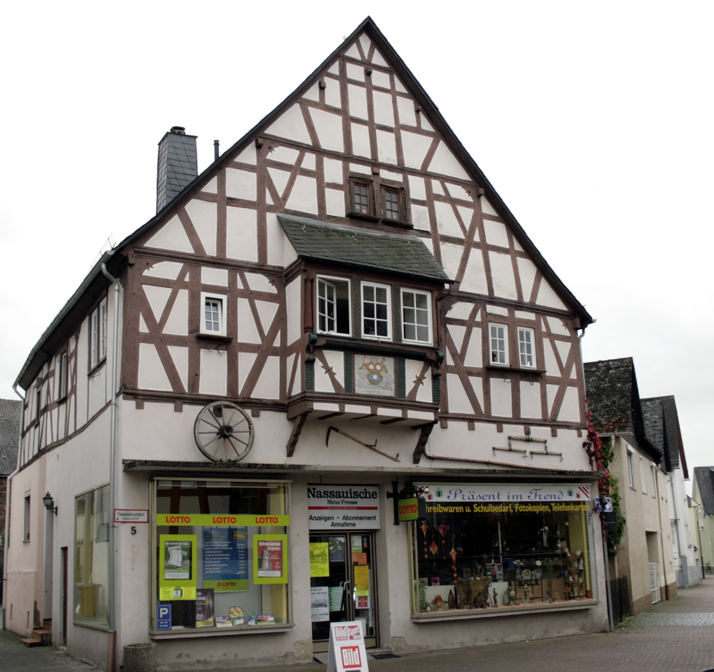 Ehemaliger hof des Klosters Schönau in Elz, Deutschland